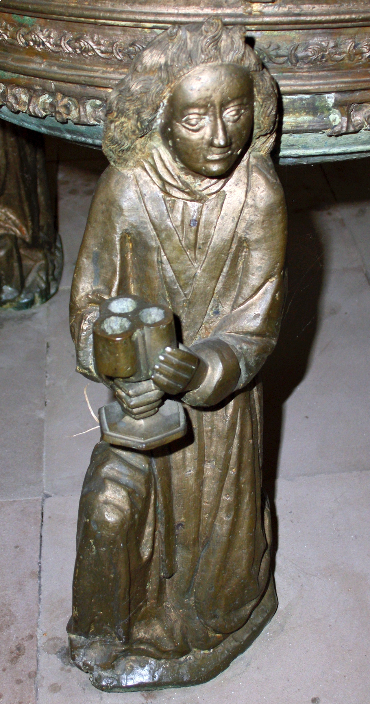 Taufbecken in St. Nicolai in Mölln, Schleswig-Holstein, gegossen 1509 von Peter Wulf. Die Tragfigur hält ein Chrismarium in ihren Händen.